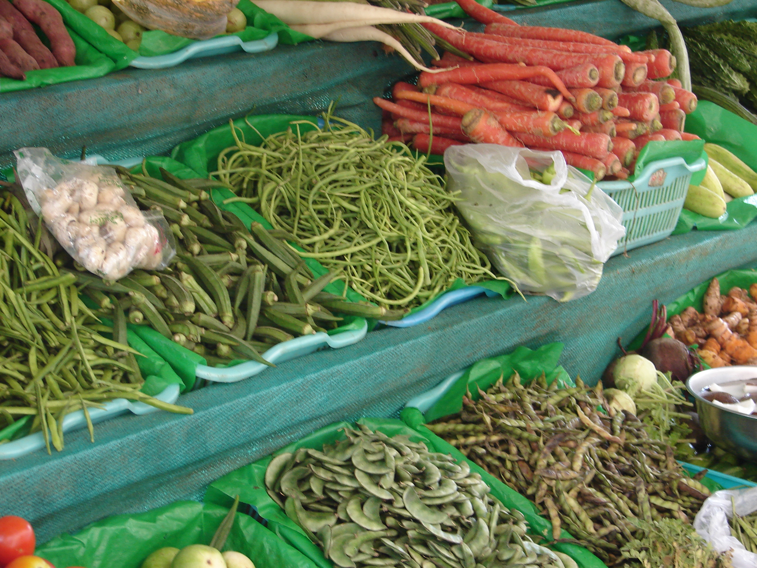 Vèneto: Veggies in Pune street-side vegetable vendor